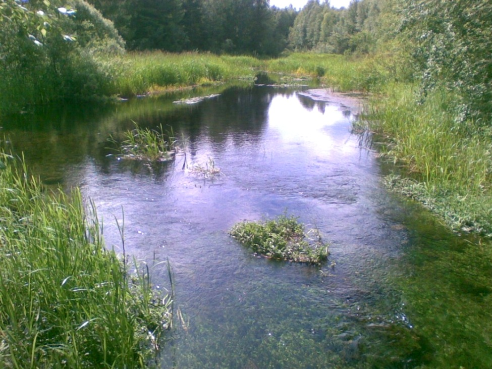 Prandi jõgi Veskiaru külas.